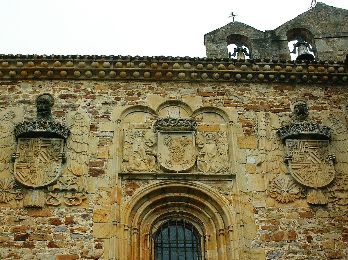 Monasterio de Bidaurreta, Oñate (Guipúzcoa)